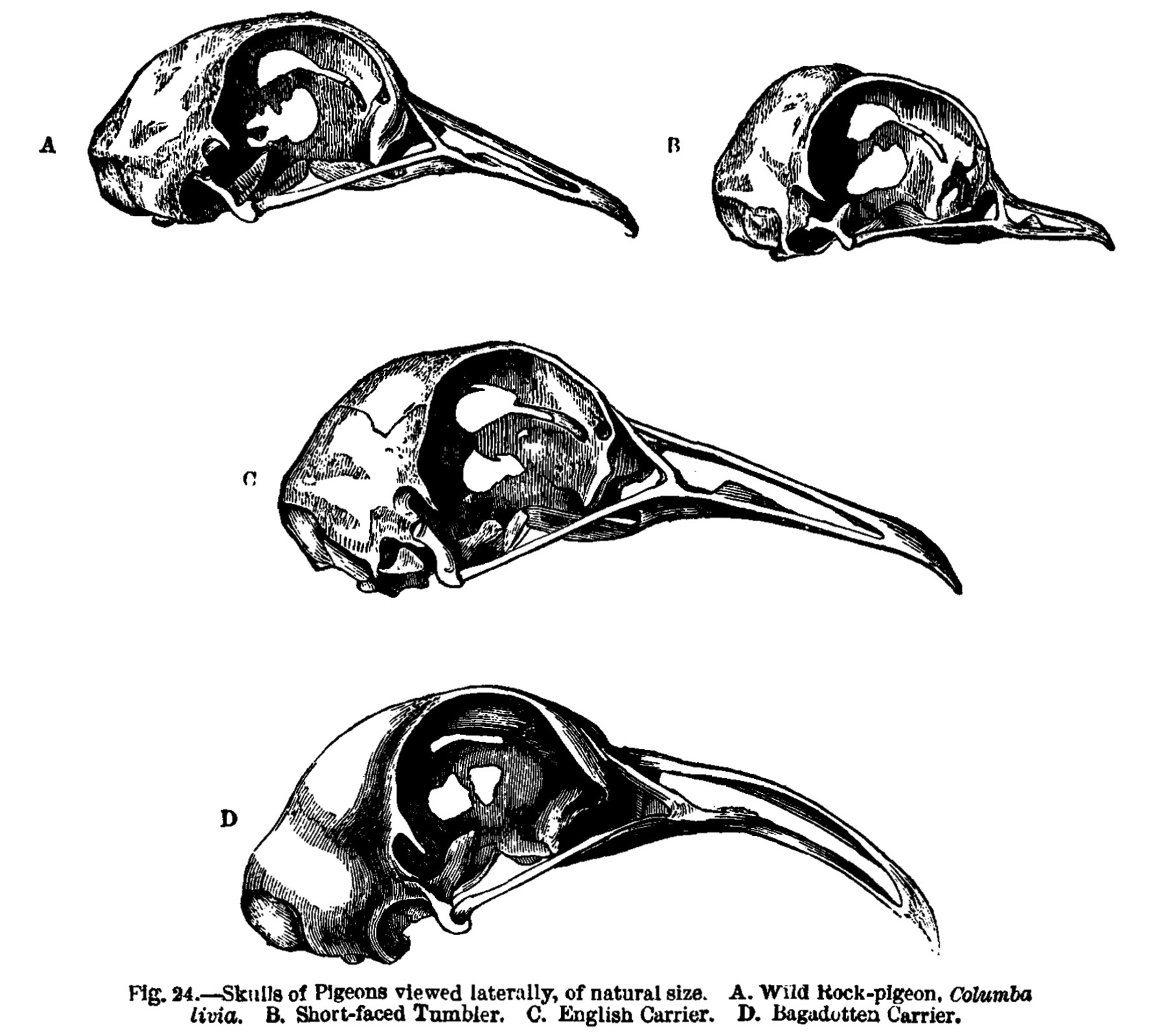 Pigeon skulls, as drawn by Darwin